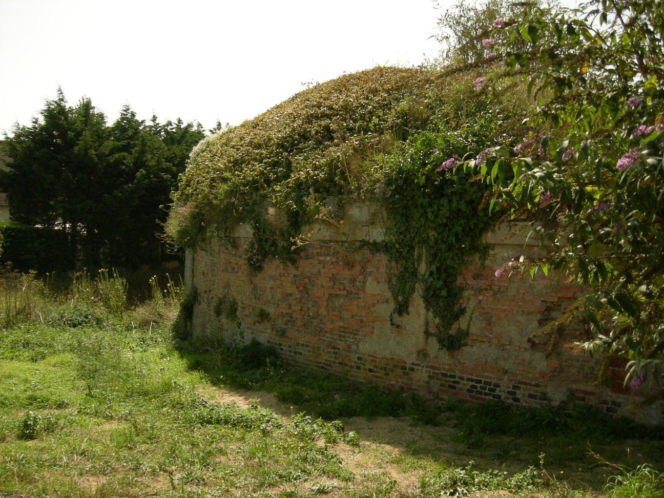 La Redoute